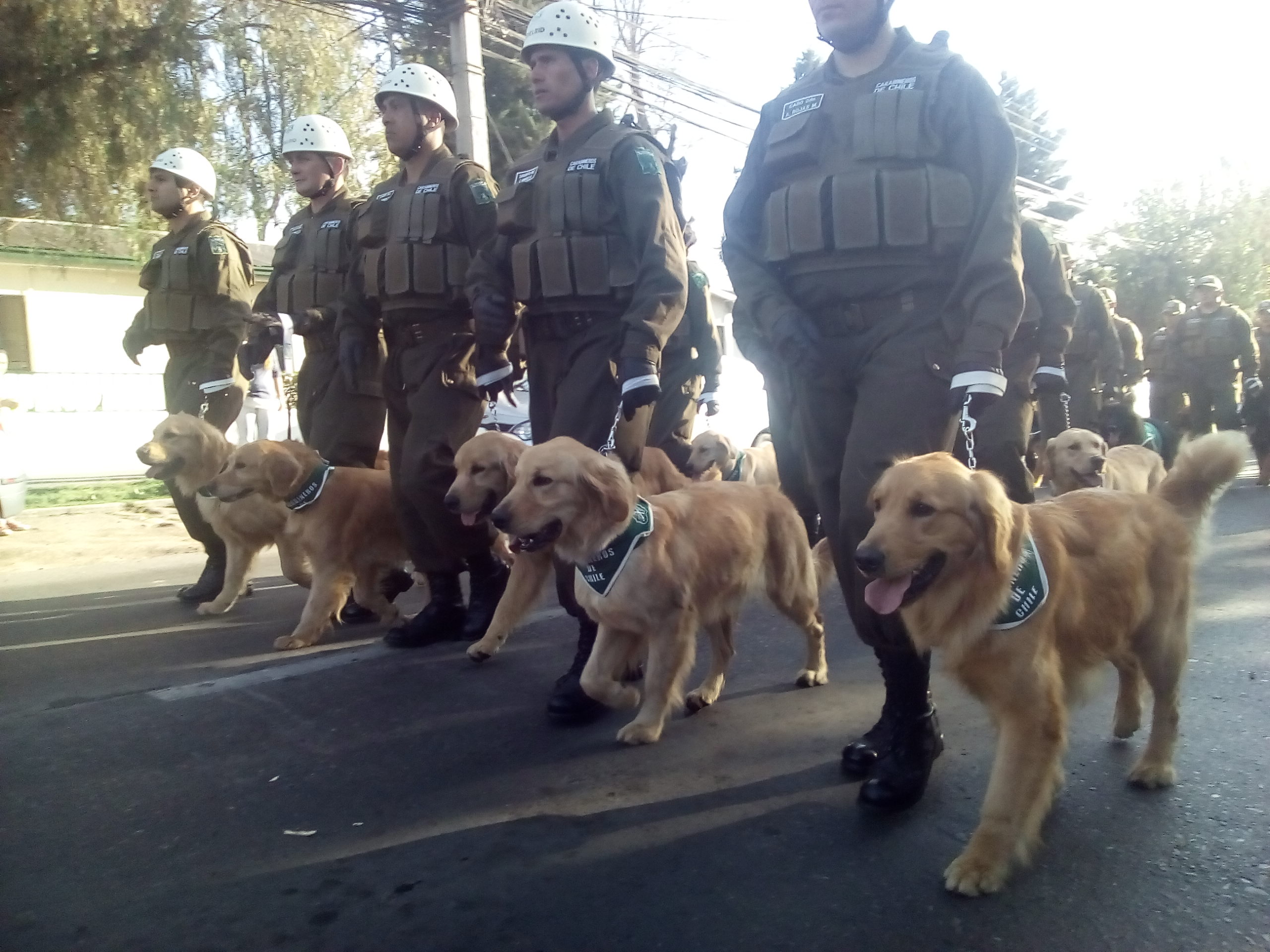 Perros de Carabineros de Chile especializados en rescatar personas bajos los escombros, en casos de edificios destruidos por terremotos, catástrofes humanos o naturales. Desfile el 19 de septiembre de 2016